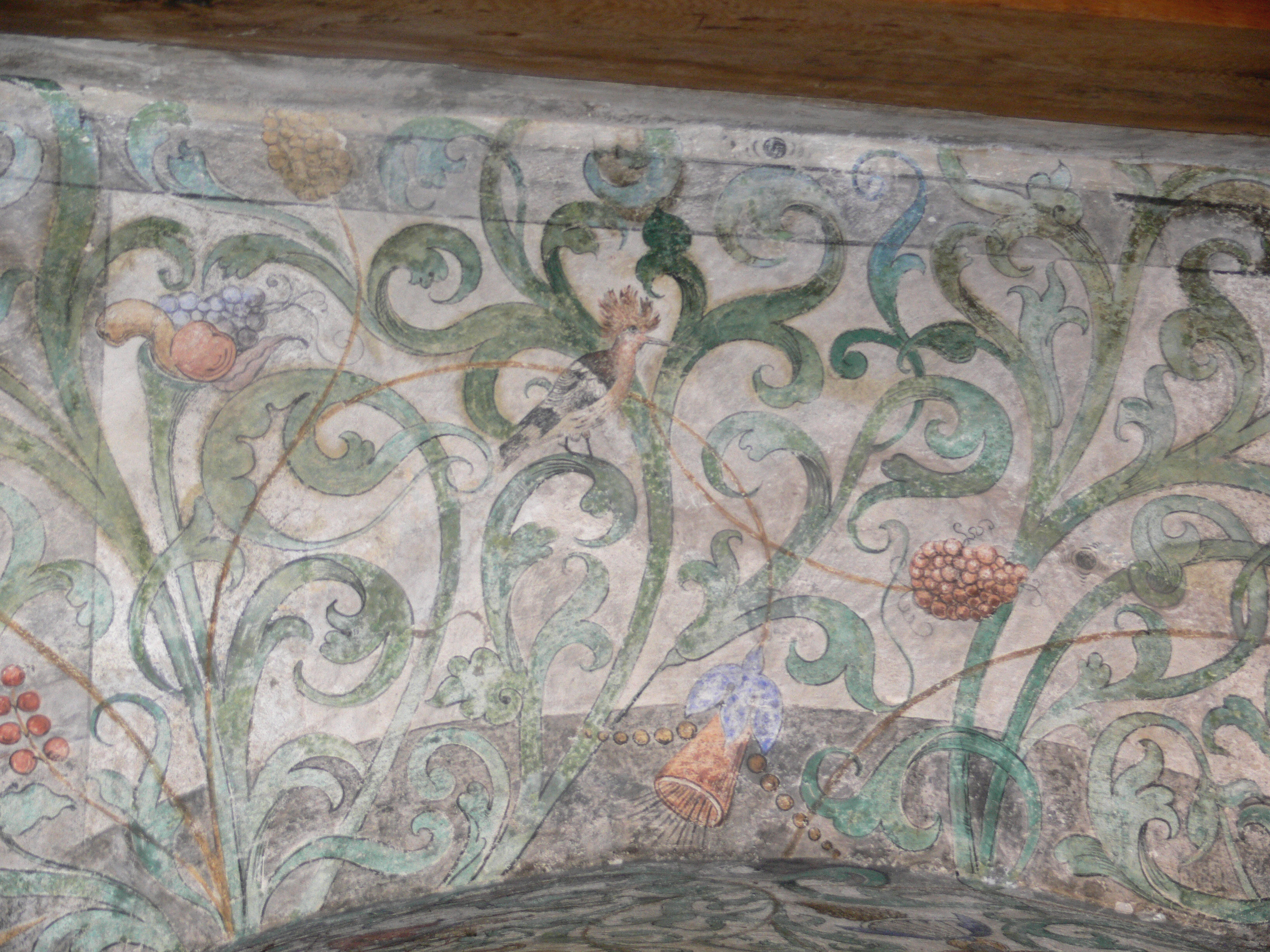 Burg Wildenstein bei Leibertingen Wandmalereien im Hauptgebäude